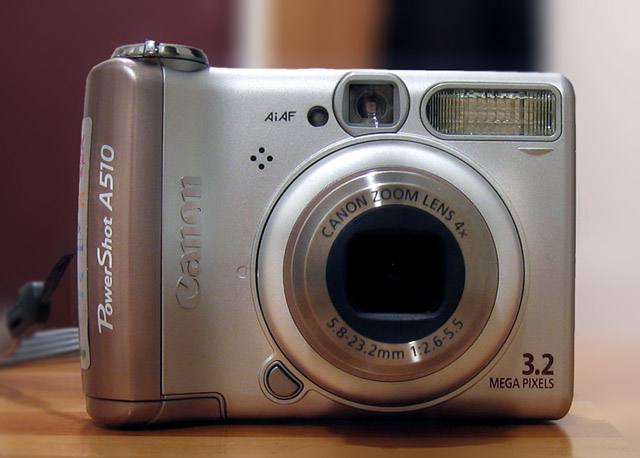 Summary Canon A510 - cyfrowy "kompaktowy" aparat fotograficzny.